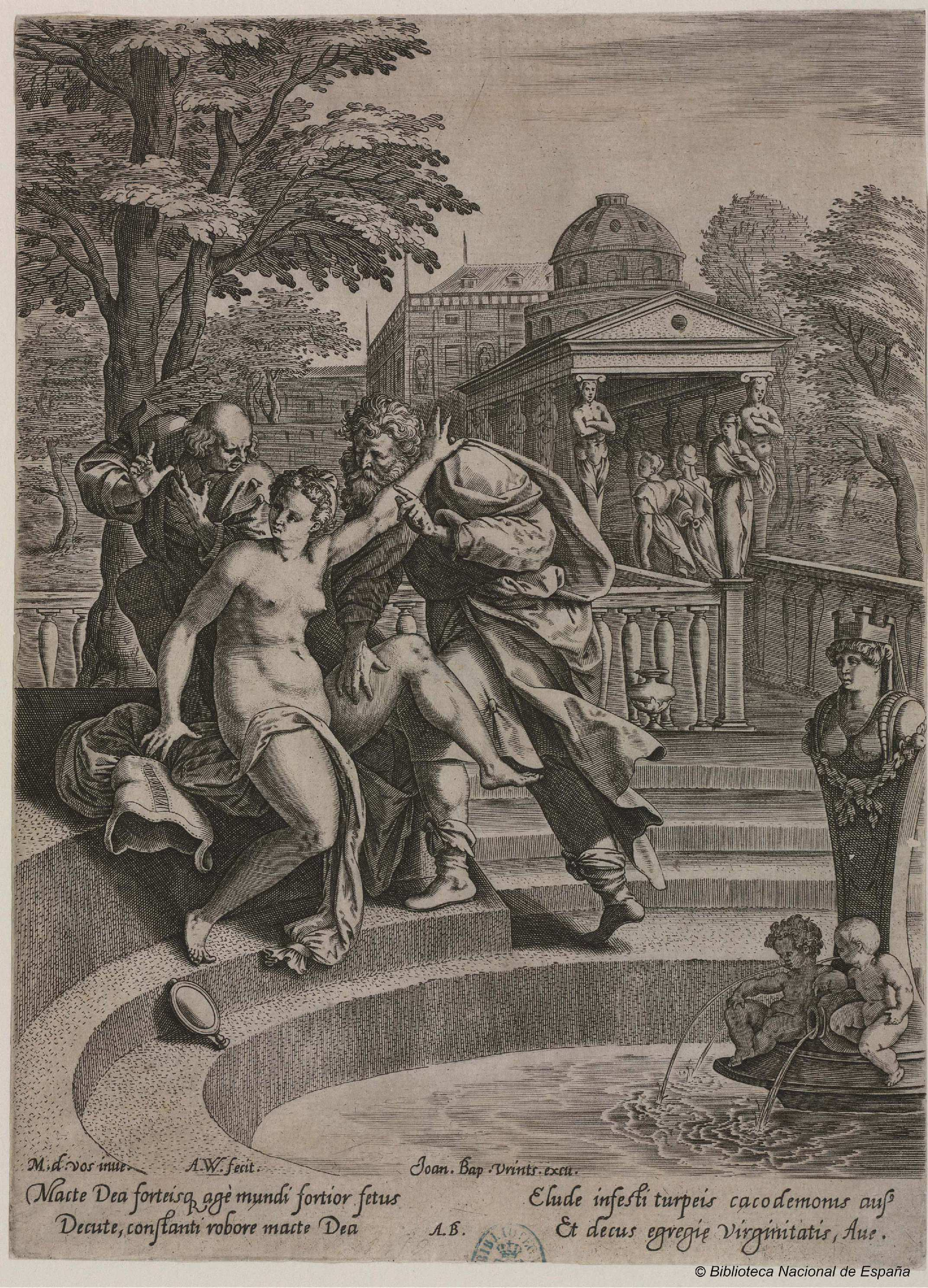 Susana y los viejos, estampa a buril firmada "M.d.Vos inve. A W. fecit. Joan Bap. Vrints excu.", Biblioteca Nacional de España